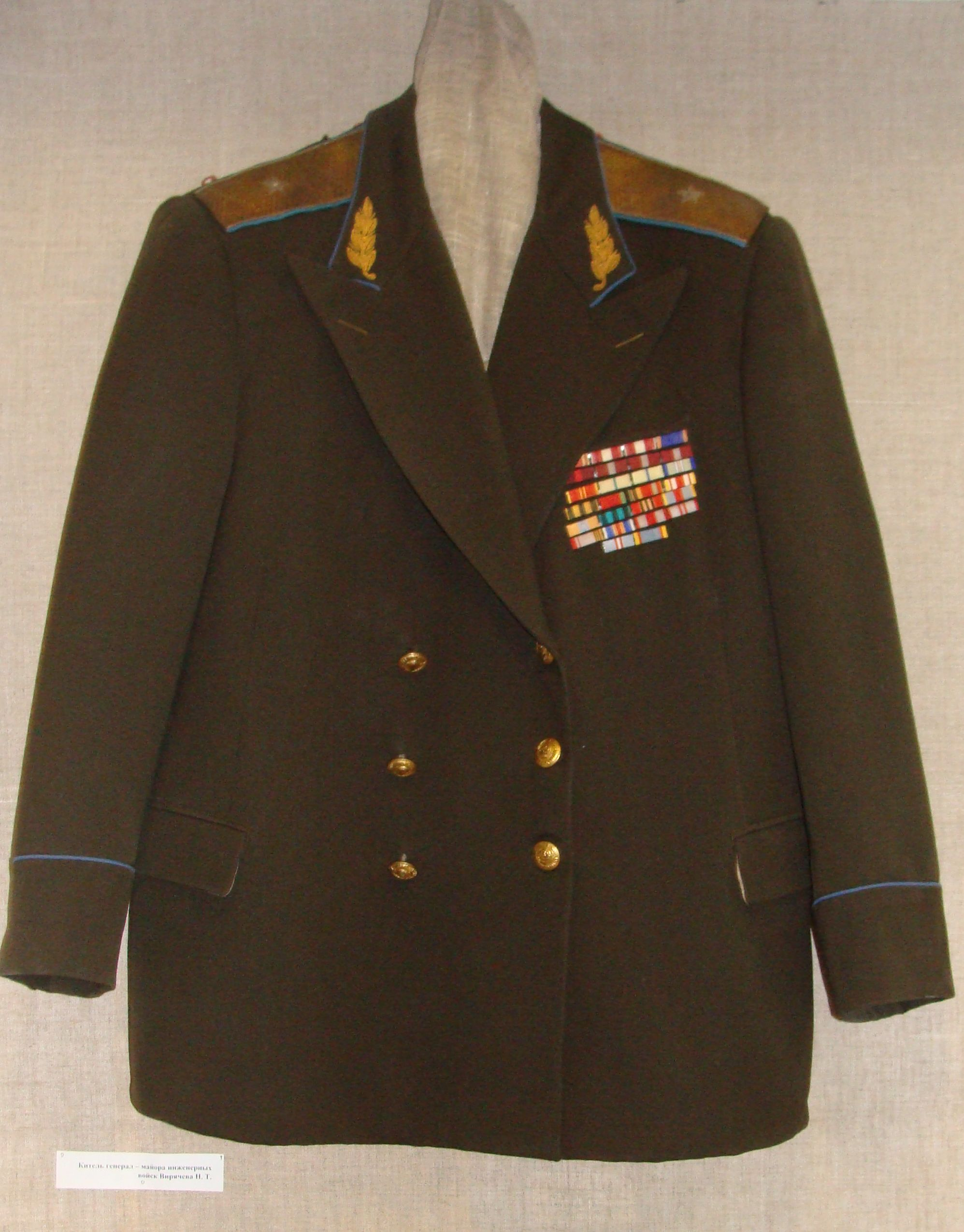 Котласский краеведческий музей. Китель генерал-майора инженерных войск